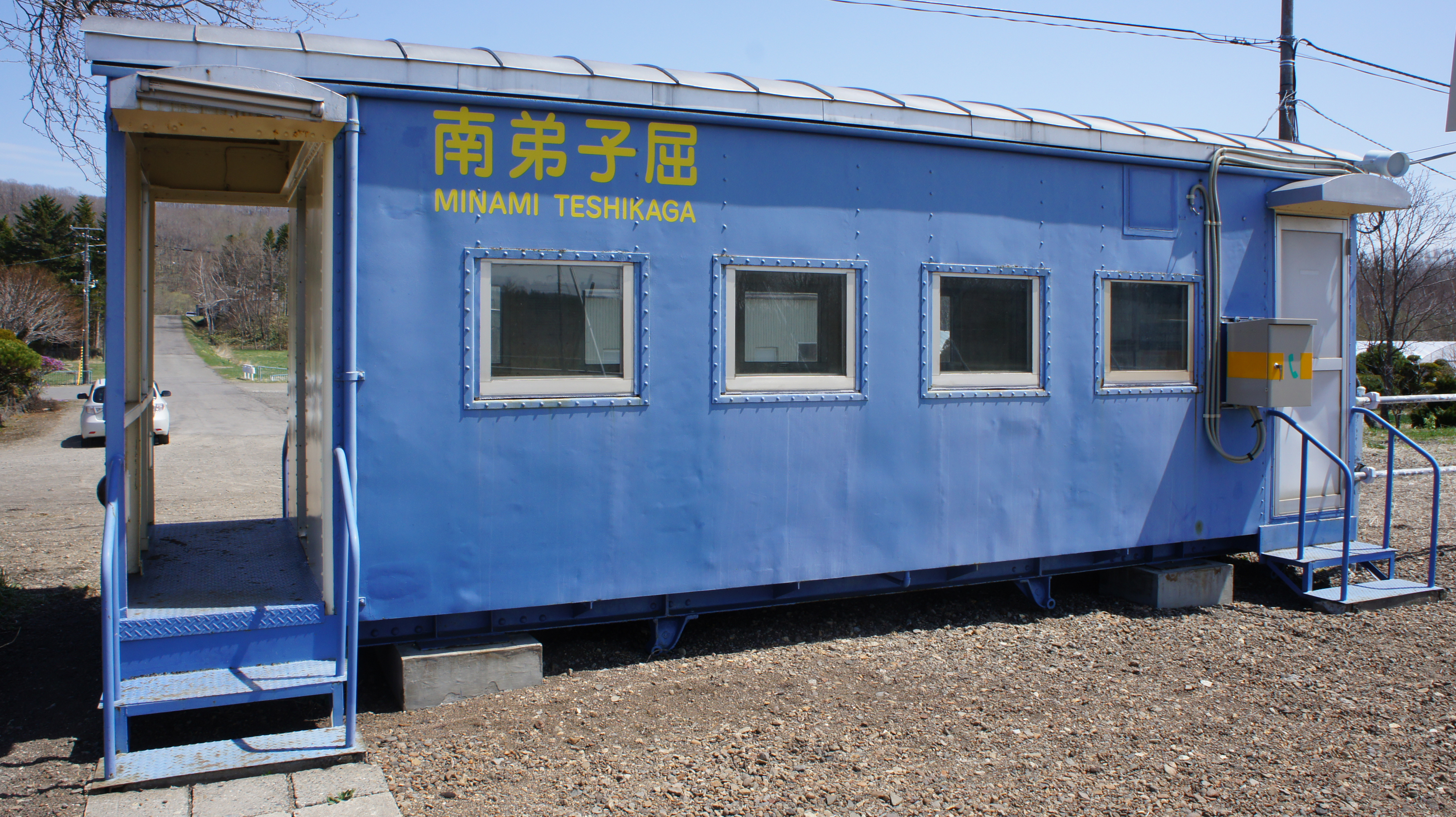 JR釧網本線・南弟子屈駅の駅舎 Sony NEX-3